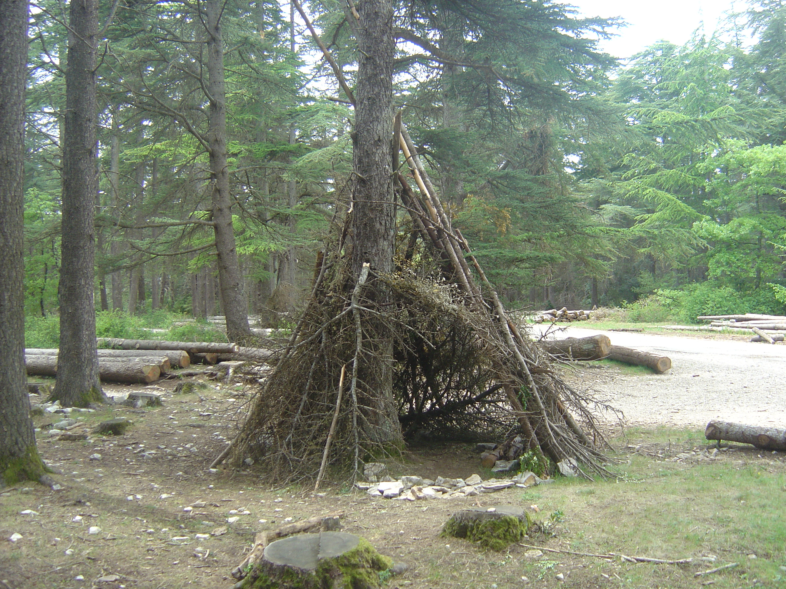 Hutte ou affût au lieu-dit le "pré de Roustan" dans la forêt des cèdres